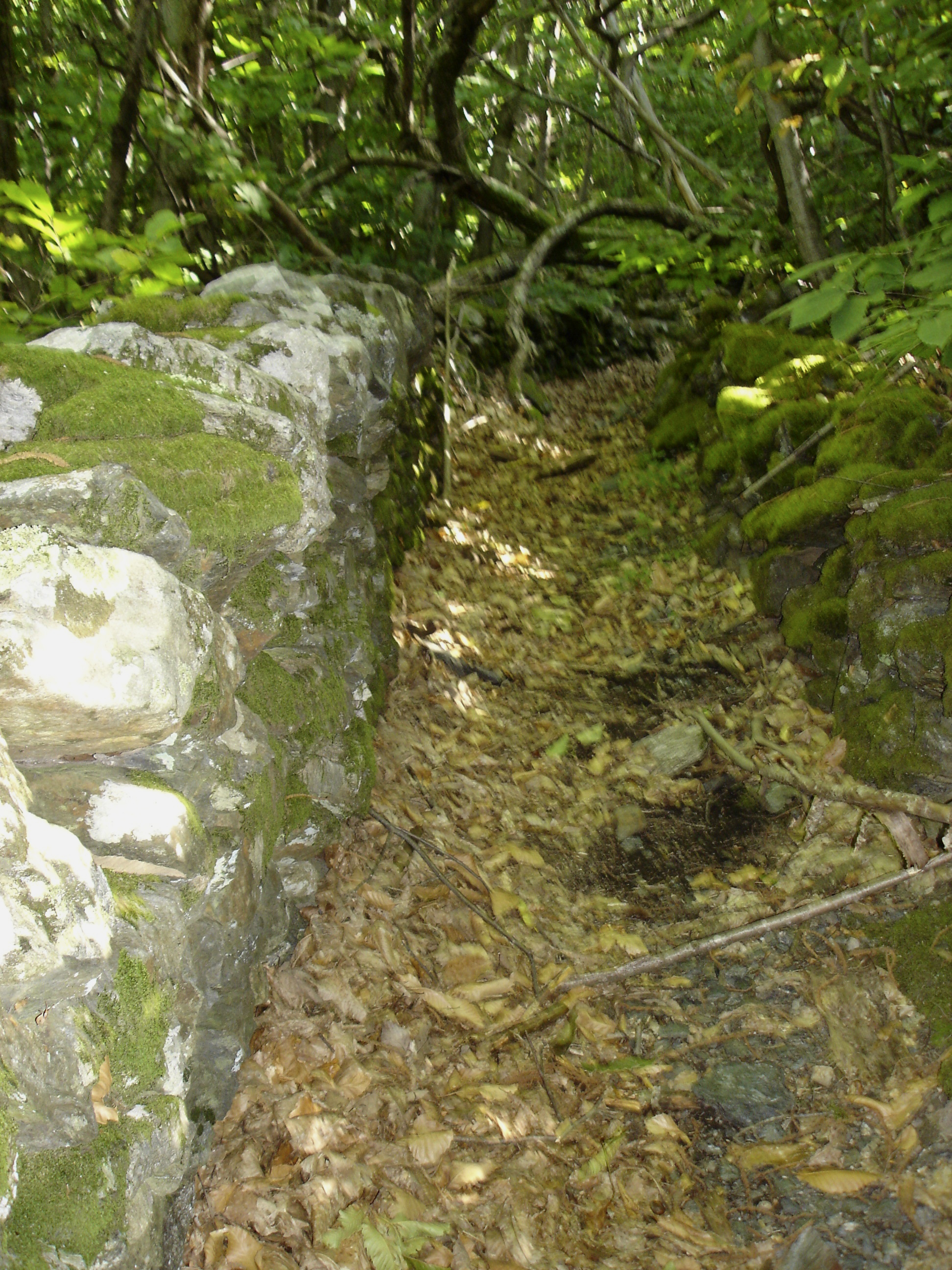 Castanet-le-Haut (Hérault)-Draille allant de La Planque vers Nostre Seigne.